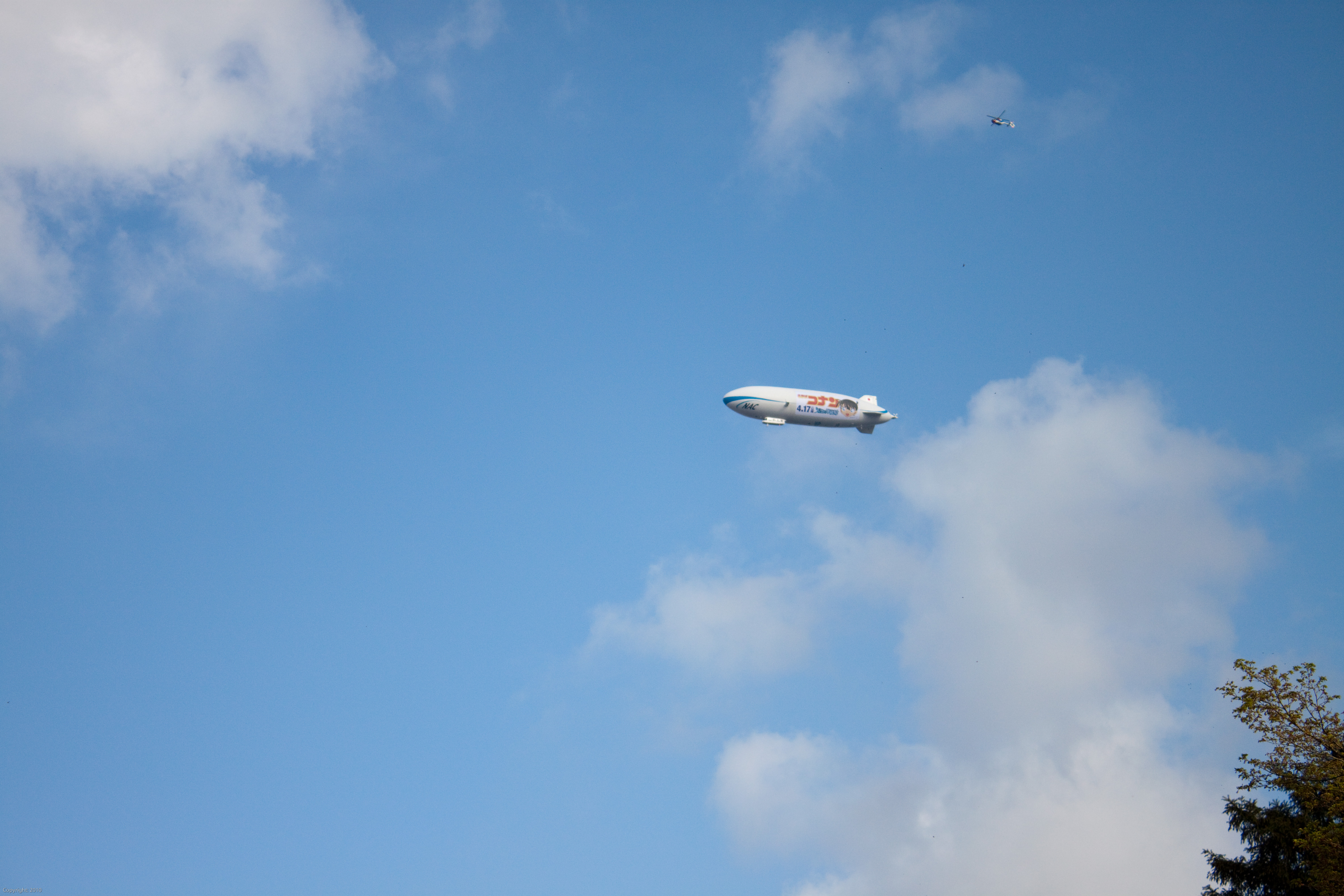 shinjukugyoen hanami (13 of 31)